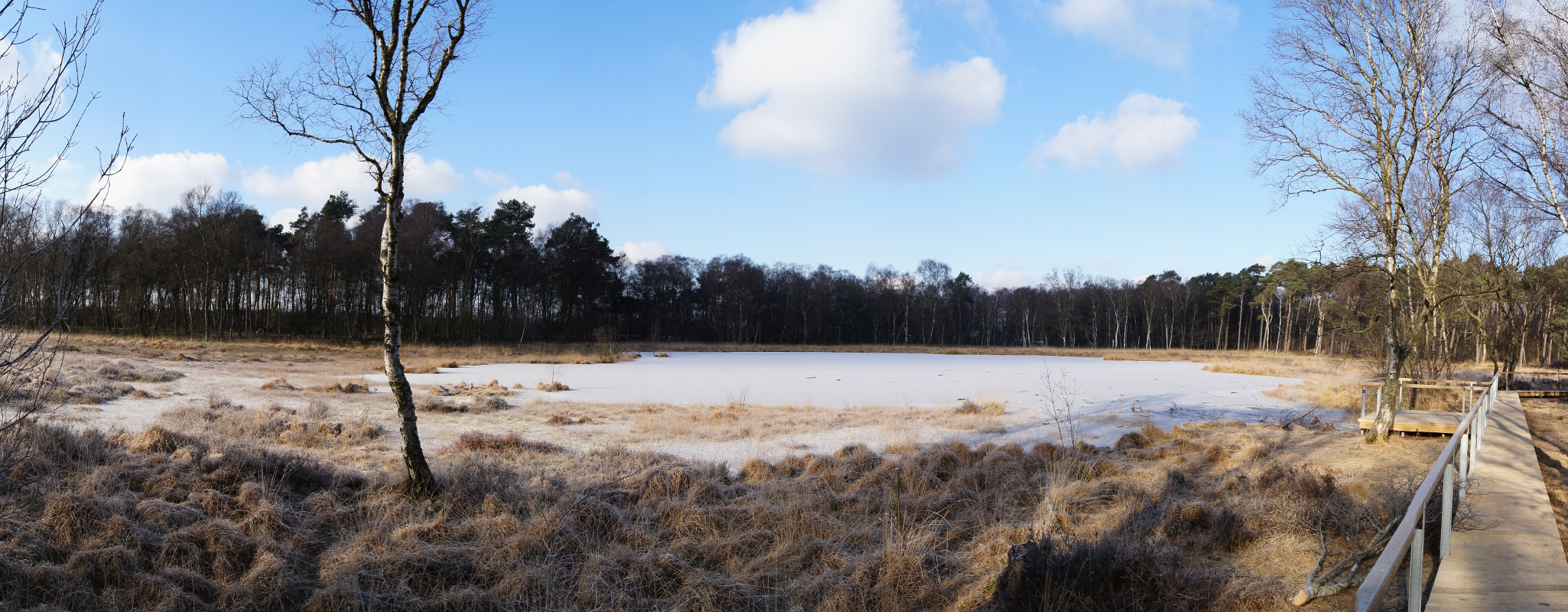 Die Fürstenkuhle bei Hochmoor am Rande der Heubachniederung im Münsterland mit dem zugefrorenen zentralen Heideweiher.